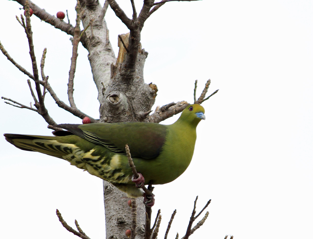 ズアカアオバト(Treron formosae) at Kohama Island